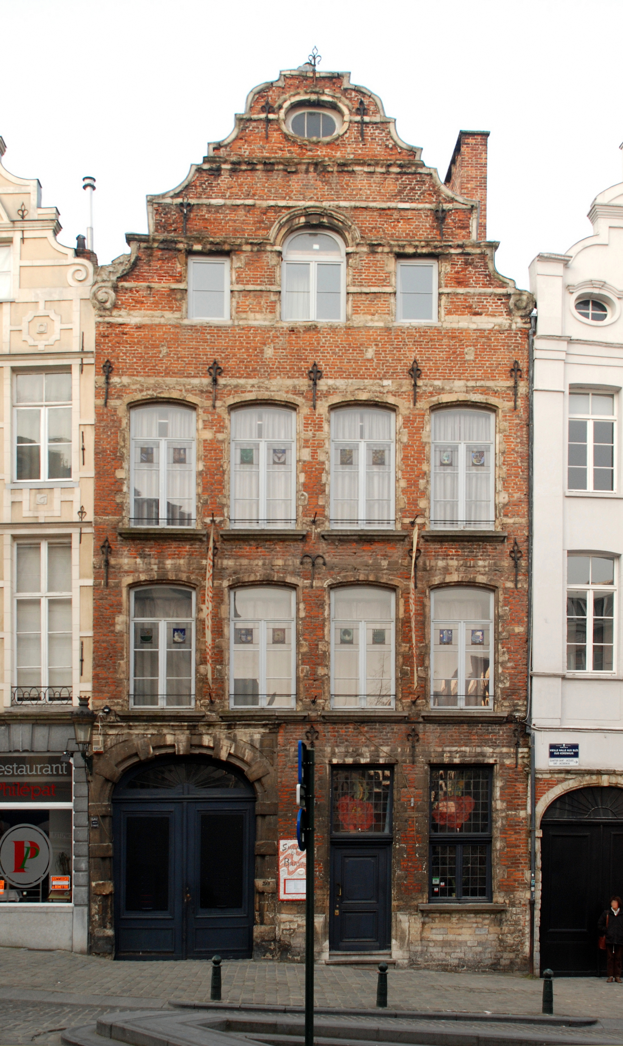 Belgique - Bruxelles - Place de la Vieille Halle aux Blés n°30 - Maison de l'Étoile d'Or (De Gulde Sterre)